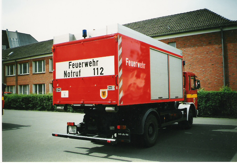 Abrollbehälter Schlauch der BF Dortmund